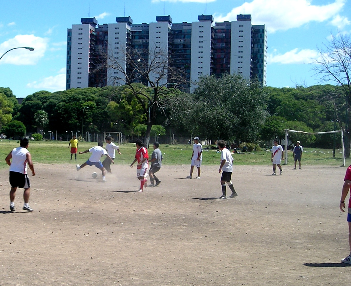 "Fútbol de potrero", Buenos Aires, Argentina.